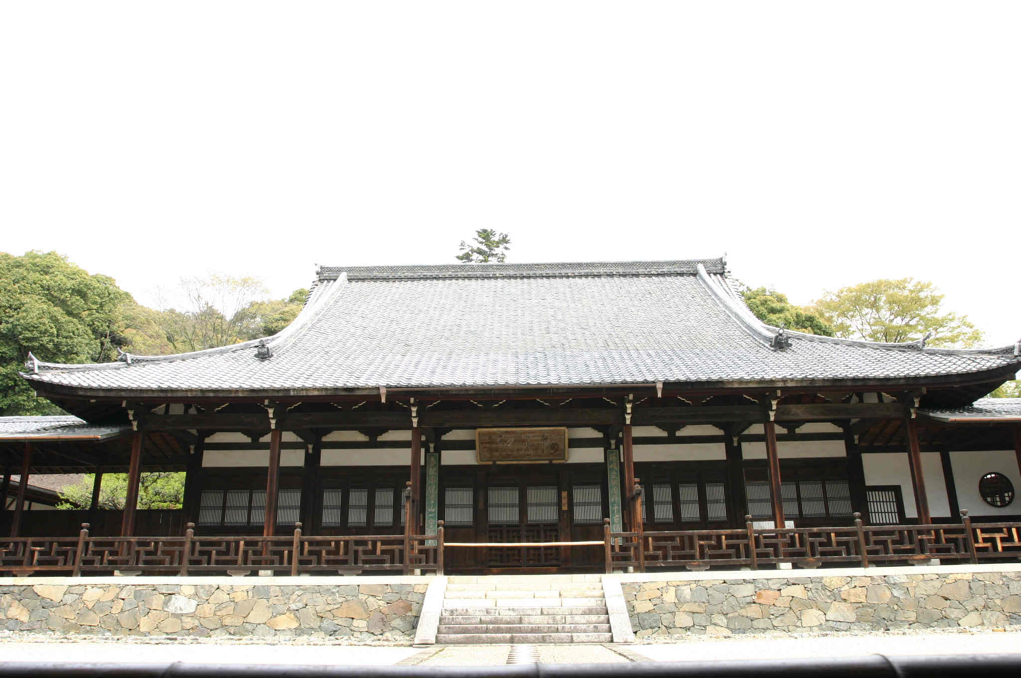 Manpuku temple